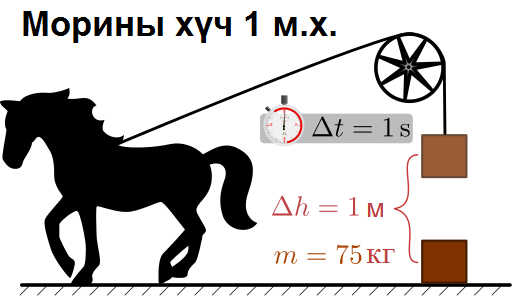 Pferdestaerke Монгол: морины хүч